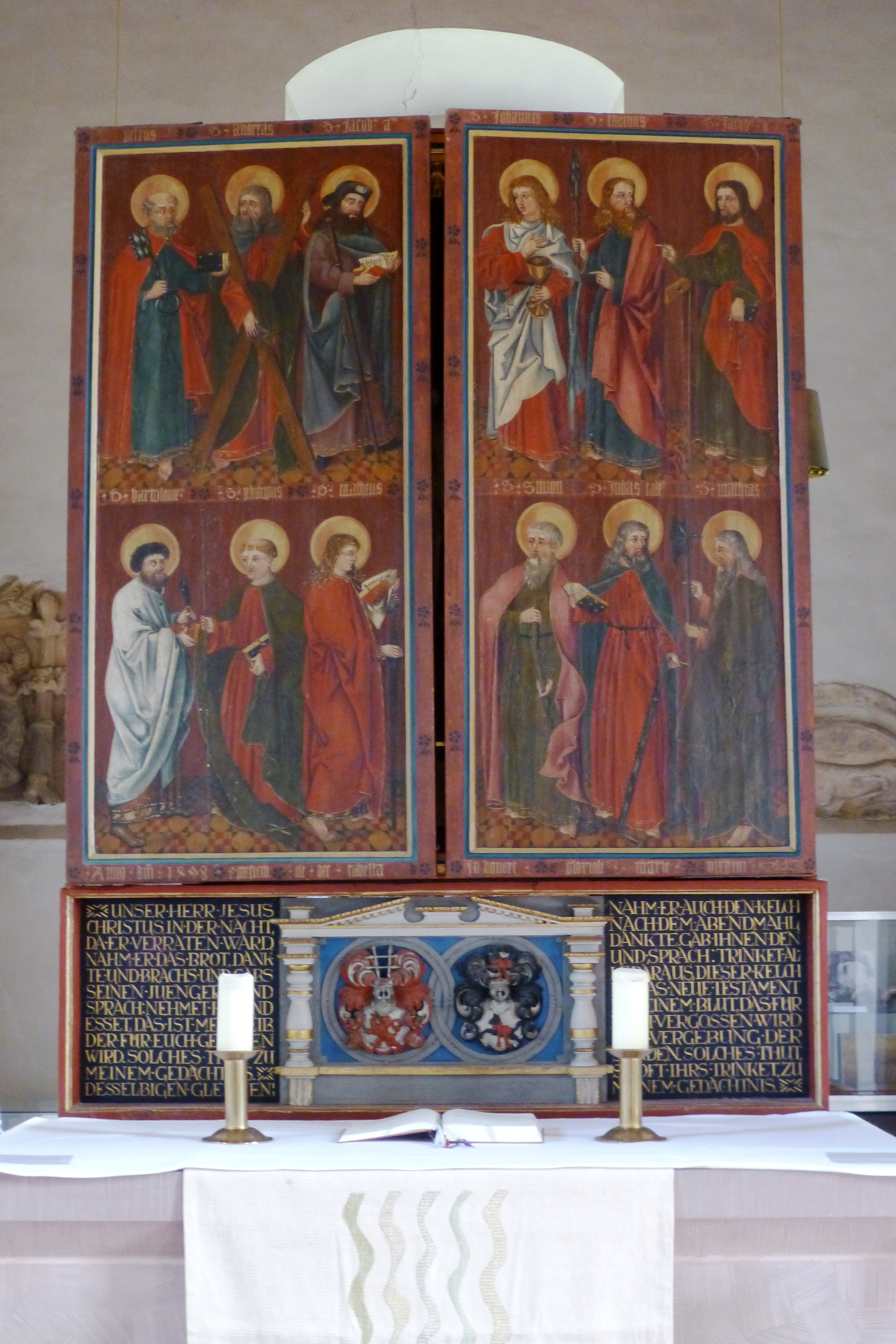 Alltagsseite des spätgotischen Flügelaltars in der ev.-luth. Kirche St. Christophorus in Reinhausen, Gemeinde Gleichen, Südniedersachsen. Dargestellt sind die 12 Apostel: Oben links Petrus, Andreas und Jakobus d. Ä., darunter Bartholomäus, Philippus und Matthäus, oben rechts Johannes, Thomas und Jakobus d. J. sowie unten rechts Simon der Zelot, Judas Thaddäus und Matthias, der für Judas Iskariot nachgewählte Apostel (jeweils von links). Die Inschrift am unteren Rand lautet: "Anno dni 1498 pletum est hec tabella / Jn honore gloriose marie virgini"